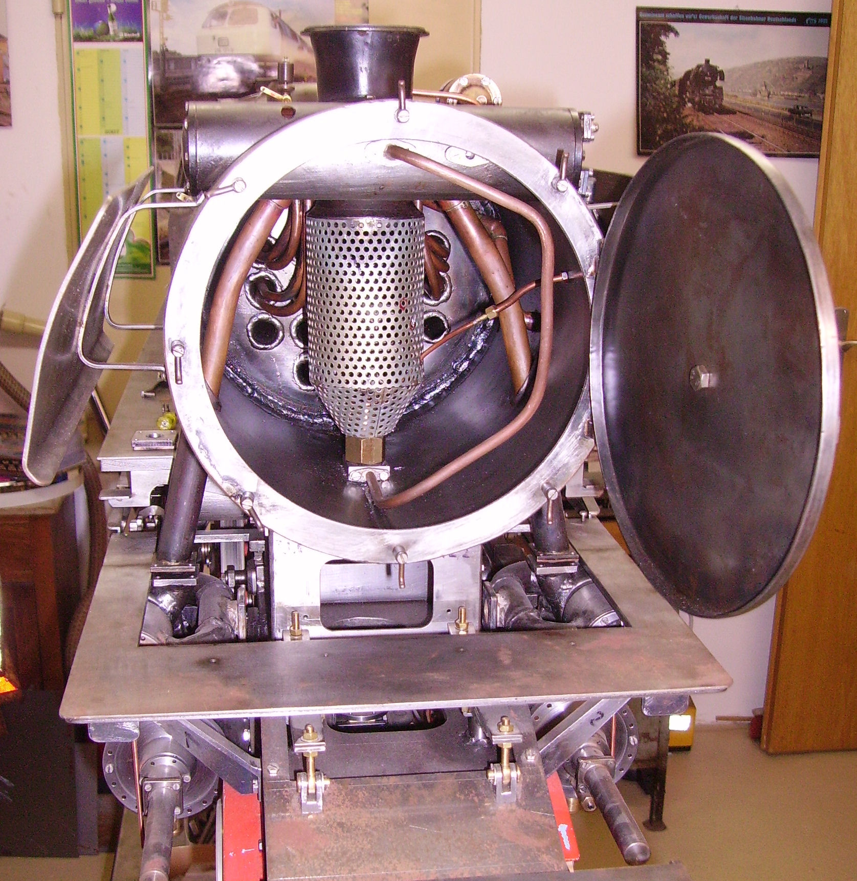 Rail transport modelling in Schifferstadt, Germany